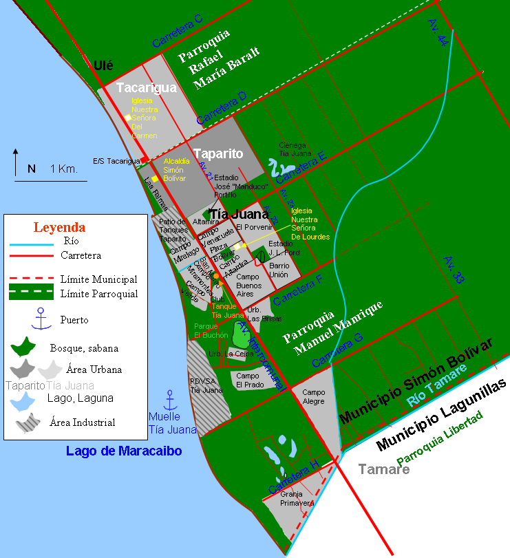 Mapa de la población de Tía Juana y pueblos vecinos, municipio Simón Bolívar, estado Zulia. Granja primavera es un suburbio de Ciudad Ojeda que quedó en el municipio Simón Bolívar al hacerse la división territorial. Este es el primer mapa de Tía Juana en cualquier lugar, se aceptan sugerencias para mejoras.